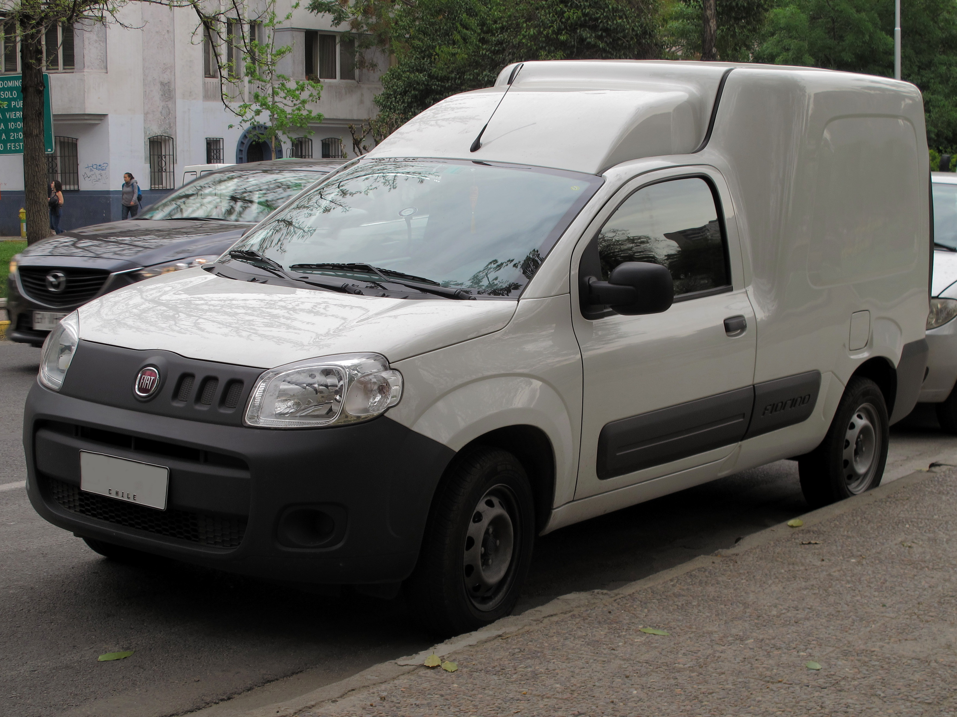 Fiat Fiorino 1.4 ELX 2015